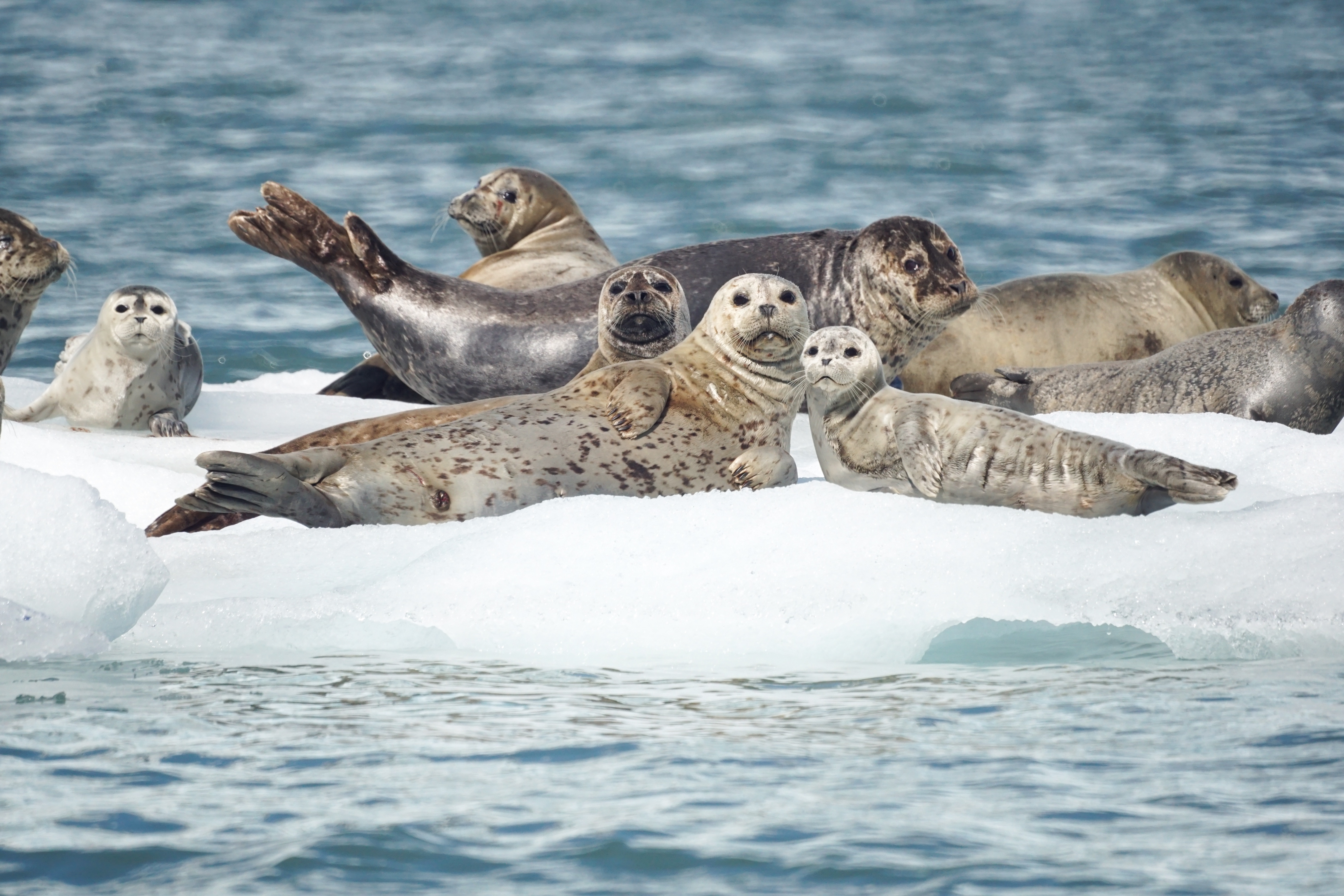 Harbor seals (Phoca vitulina).